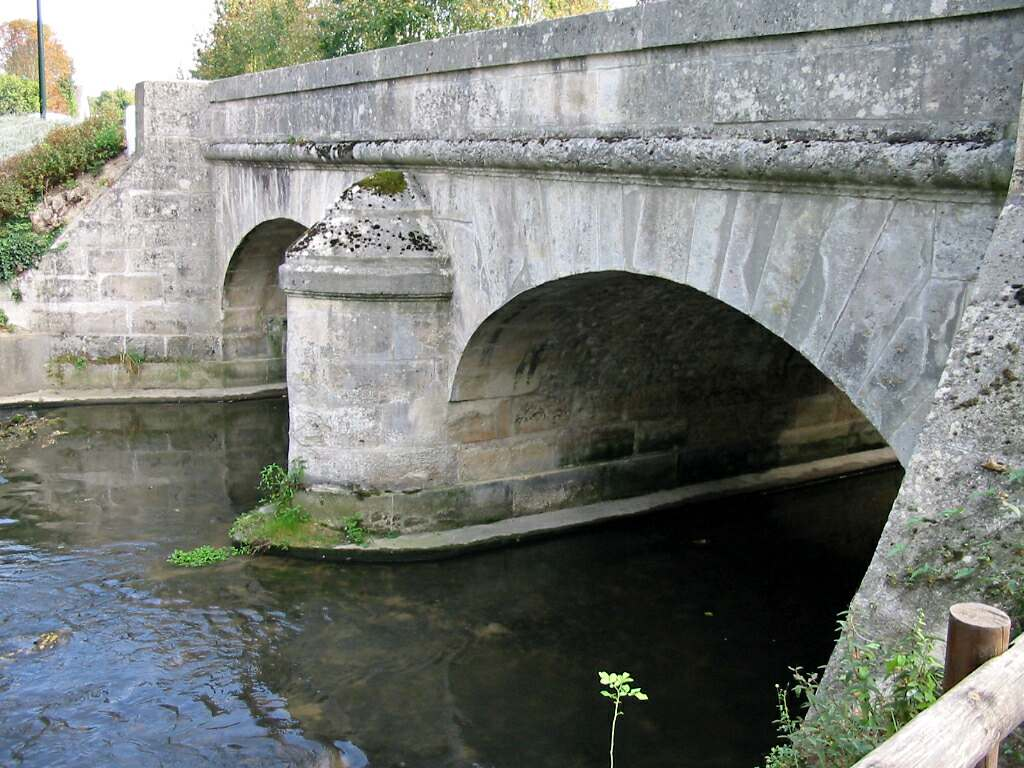 Pont routier sur la Mauldre à Mareil-sur-Mauldre (Yvelines) Photo JH Mora, octobre 2005 Mareil-sur-Mauldre Catégorie:Image de la Mauldre Catégorie:Image de Mareil-sur-Mauldre